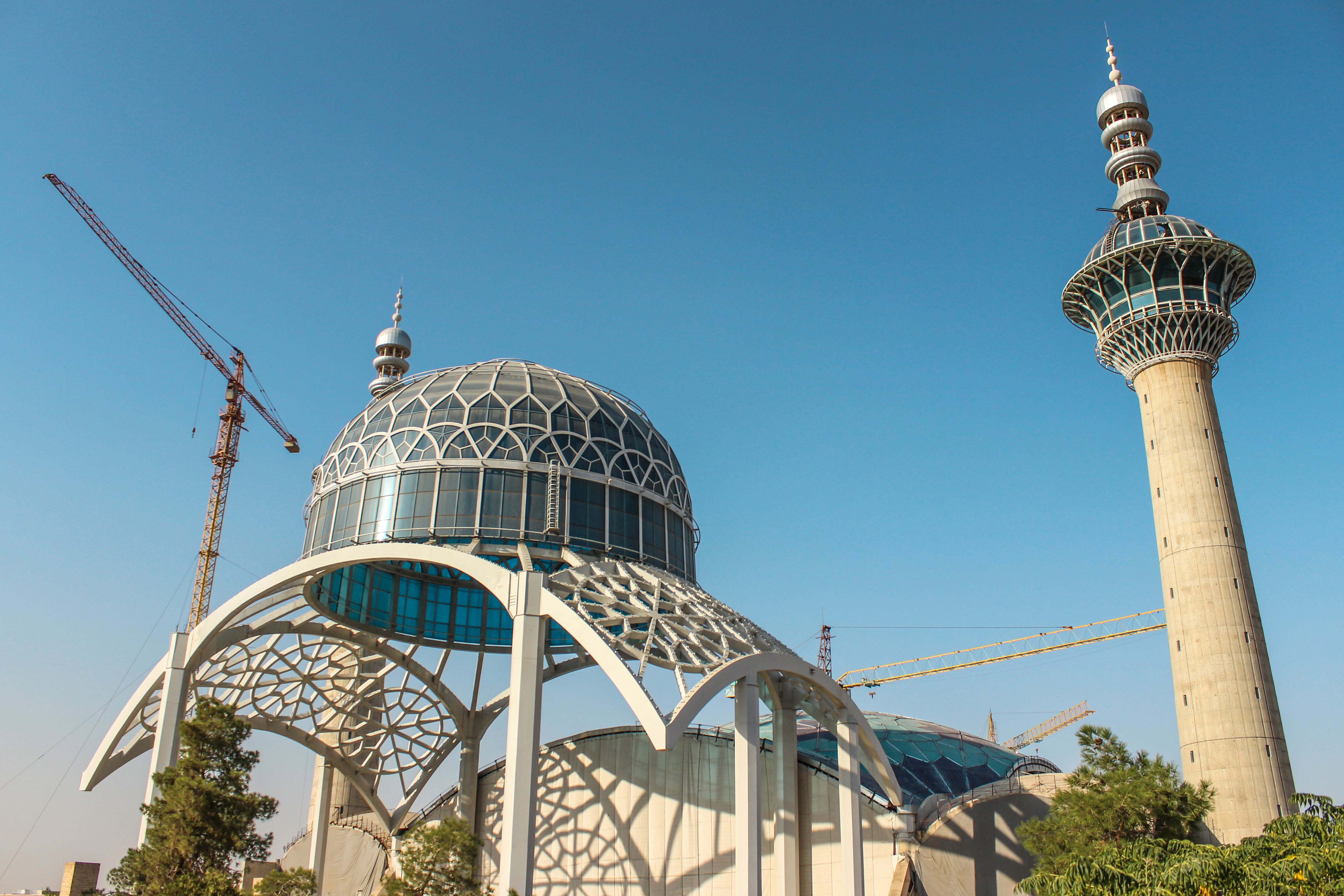 مسجد مصلی اصفهان